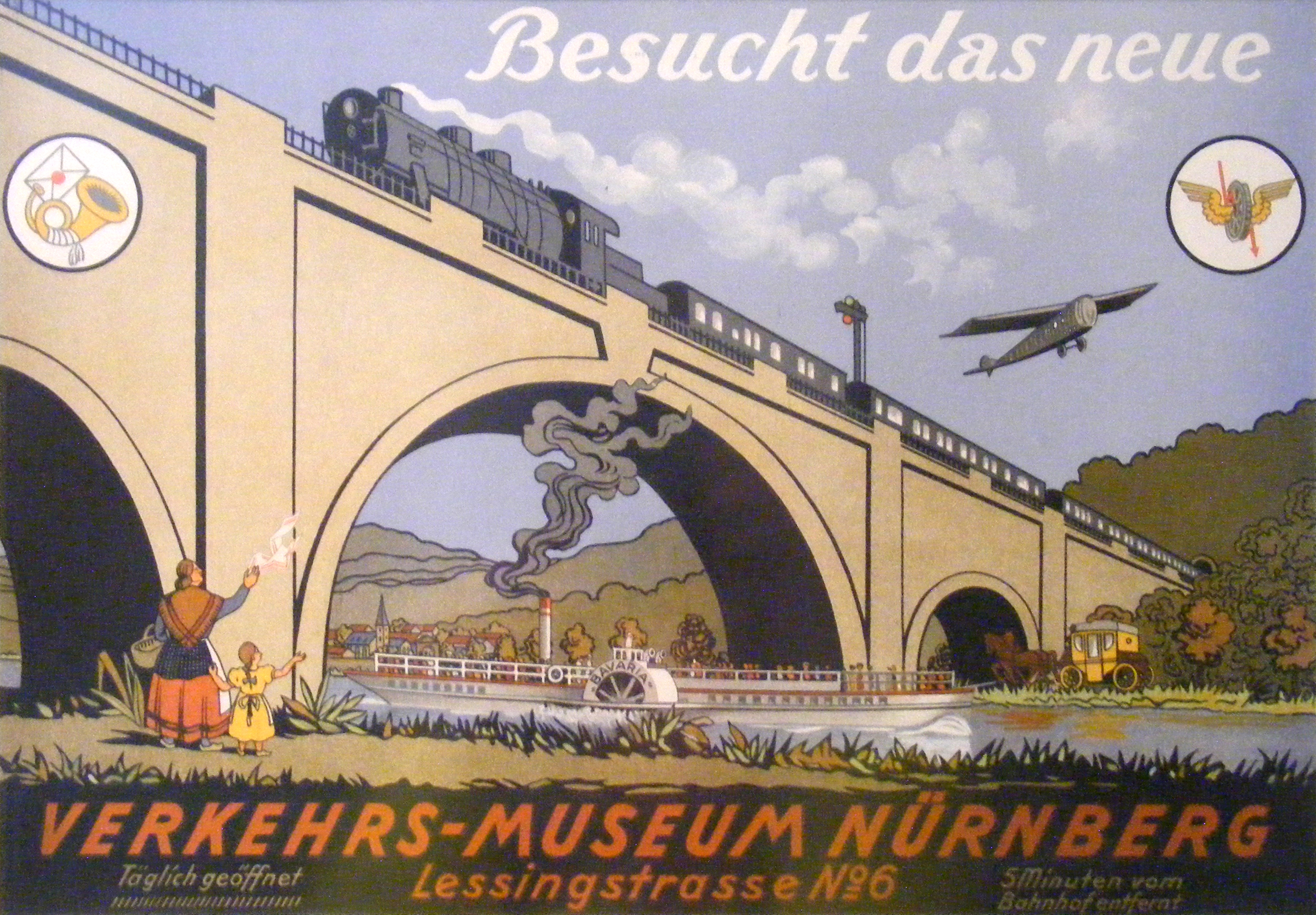 Werbeplakat "Besucht das neue Verkehrs-Museum Nürnberg", 1925/1926